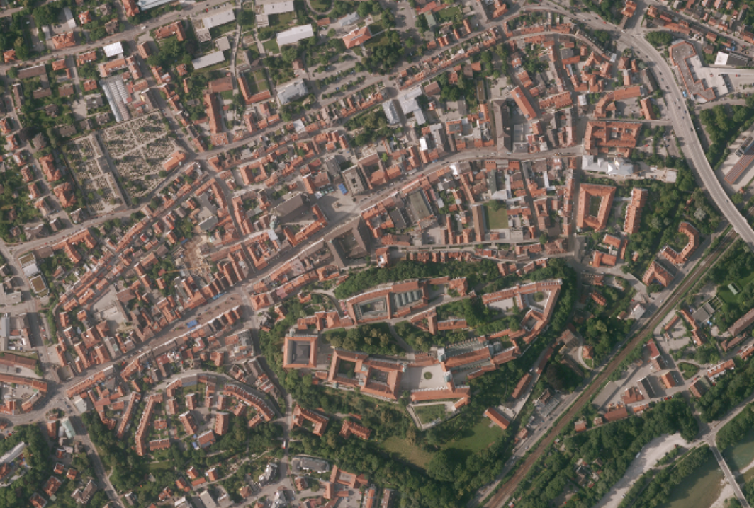 Luftaufnahme der Bayerischen Vermessungsverwaltung: Altstadt und Domberg in Freising, Landkreis Freising, Bayern.